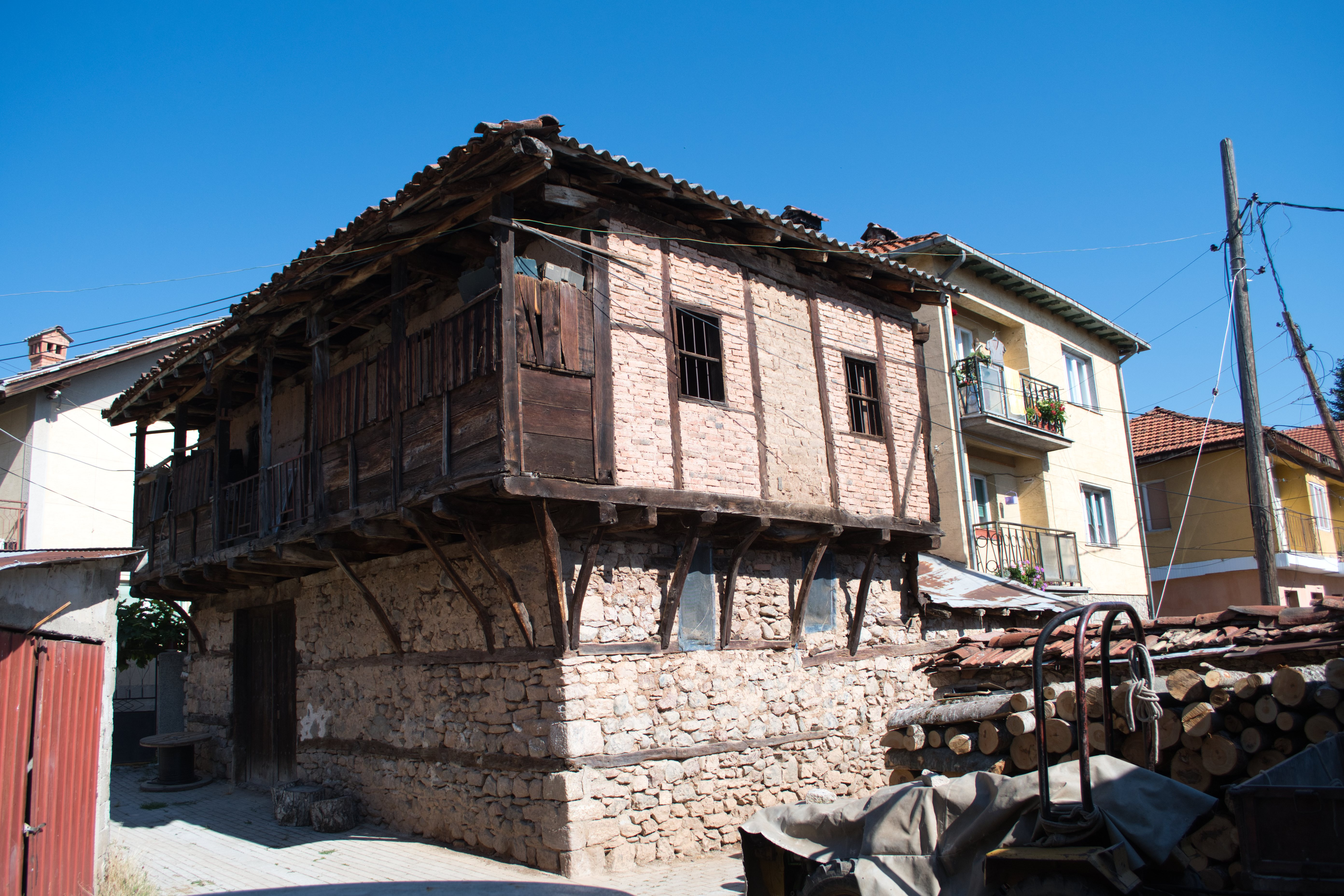 Куќата на Плушковци во селото Вевчани